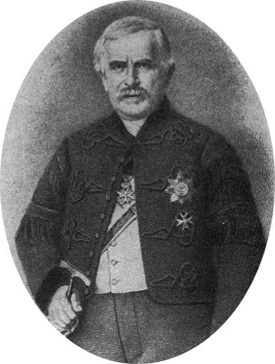 Otto Ludwig Krug von Nidda (1810–1885), preußischer Beamter, Bergrat und Reichstagsabgeordneter